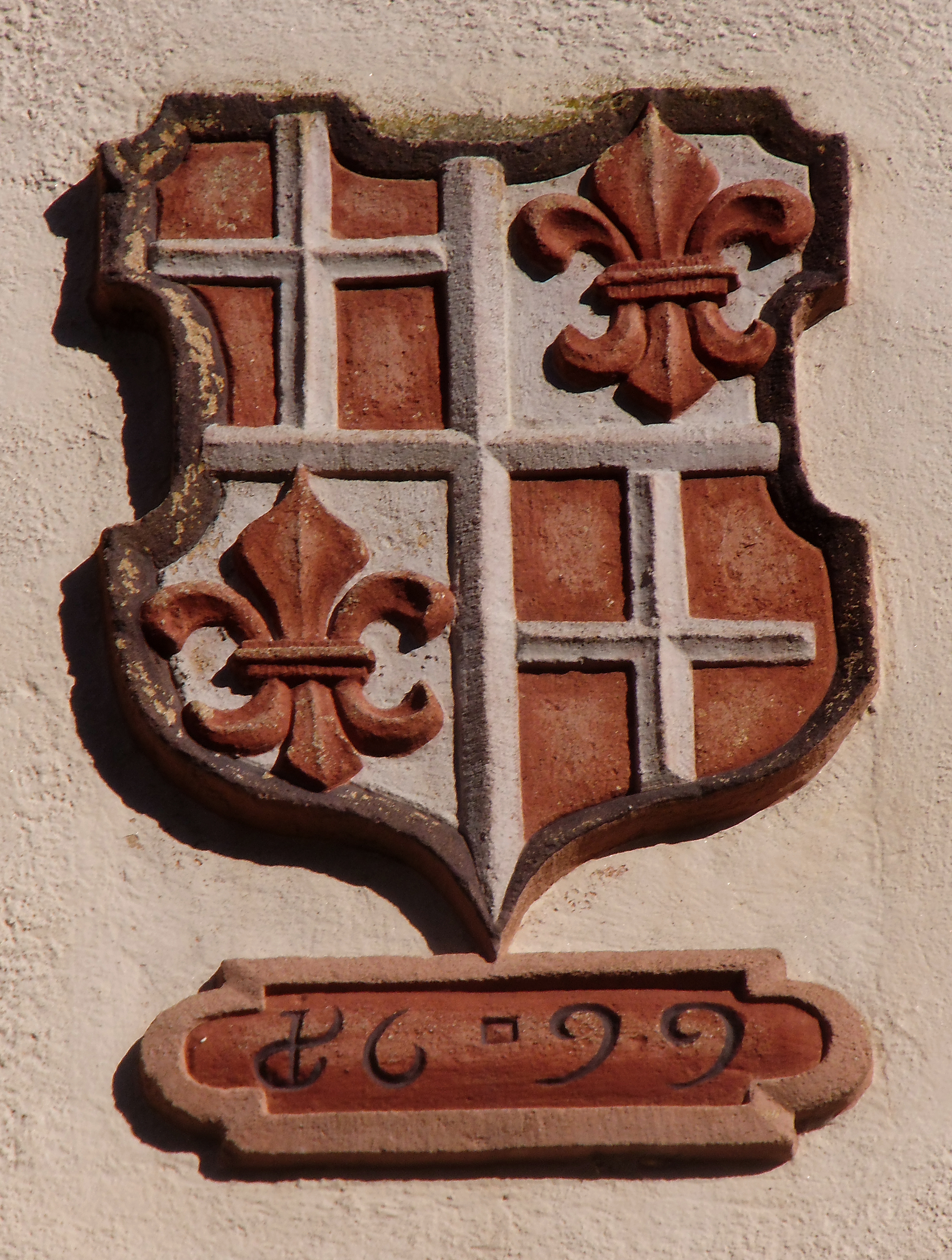 Wappen des Johanniter Großpriors Hermann von Wachtendonck am Schloss in Heitersheim